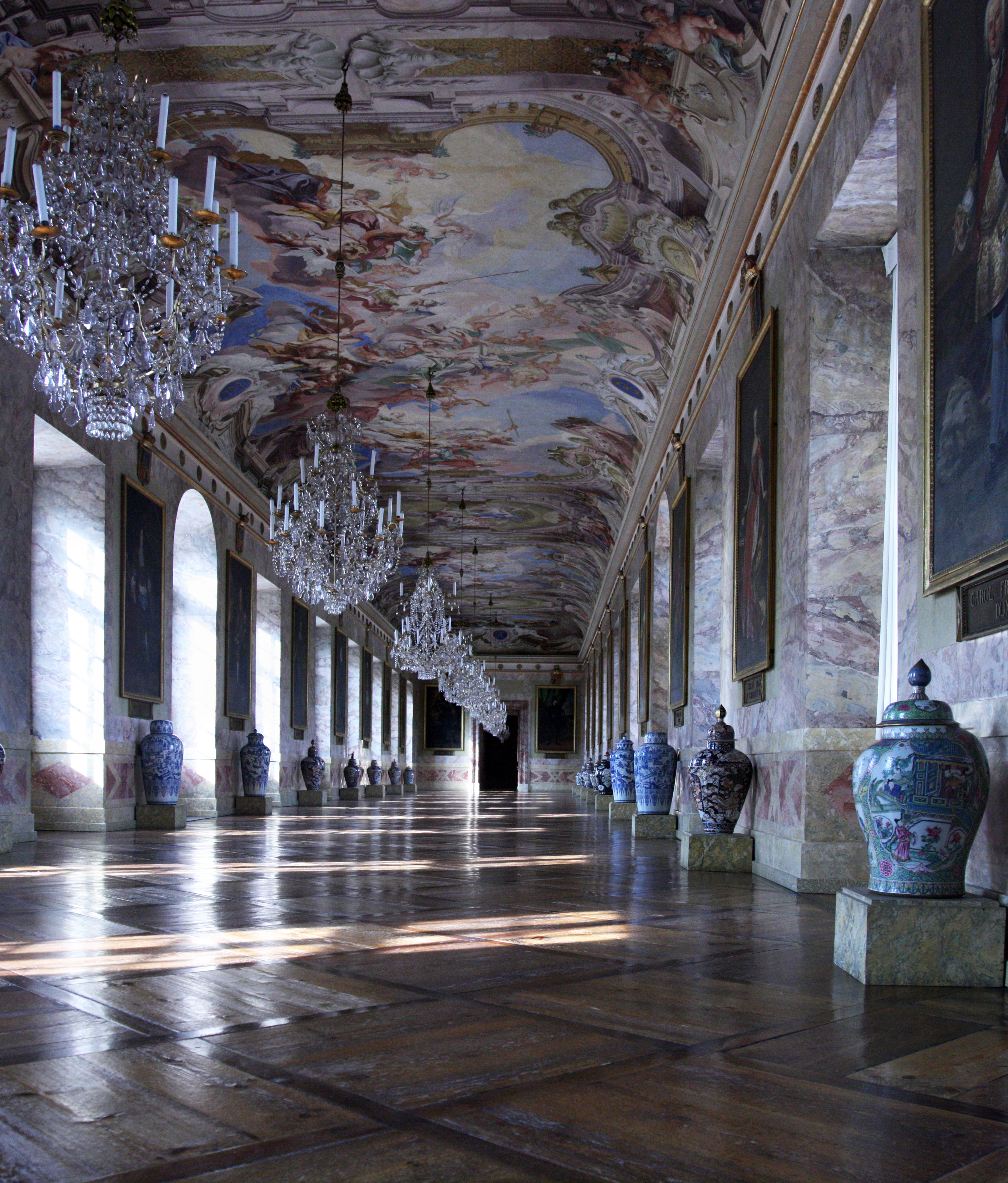 Ahnengalerie im Residenzschloss Ludwigsburg, Deckengemälde von Carlo Carlone